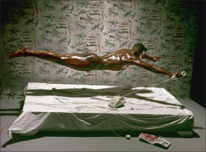 Gerhard_vormwald-the_fliing_black_men_-paris-1983